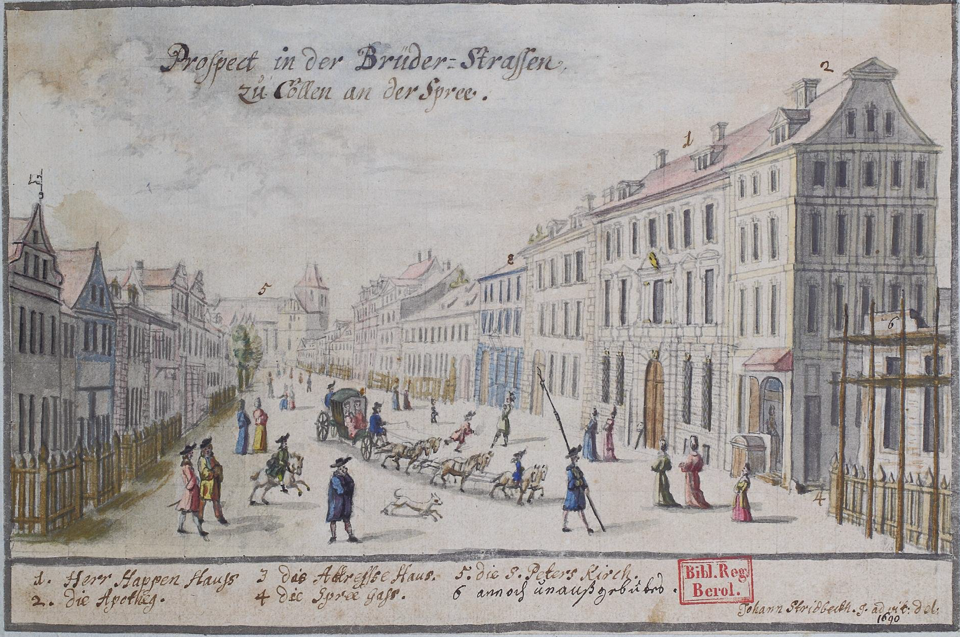 Das Happesche Haus in der Brüderstraße im Jahr 1690 (1) von Johann Stridbeck dem Jüngeren